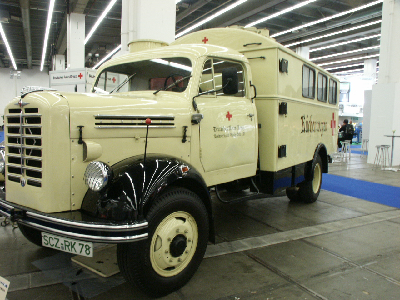 Borgward B4500